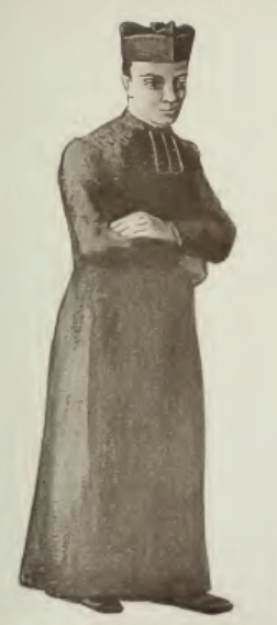 Illustration d'Henri-Gabriel Ibels (1867-1936) pour "Sébastien Roch", roman d'Octave Mirbeau (1848-1917). Éditions Fasquelle, 1906.